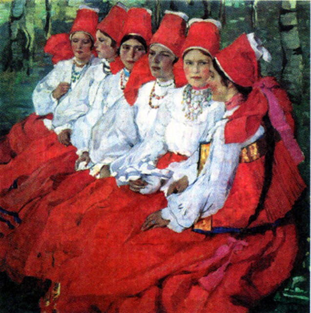 Киселёва Е.А. Невесты, 1906-1907, Научно-исследовательский музей при Российской академии художеств